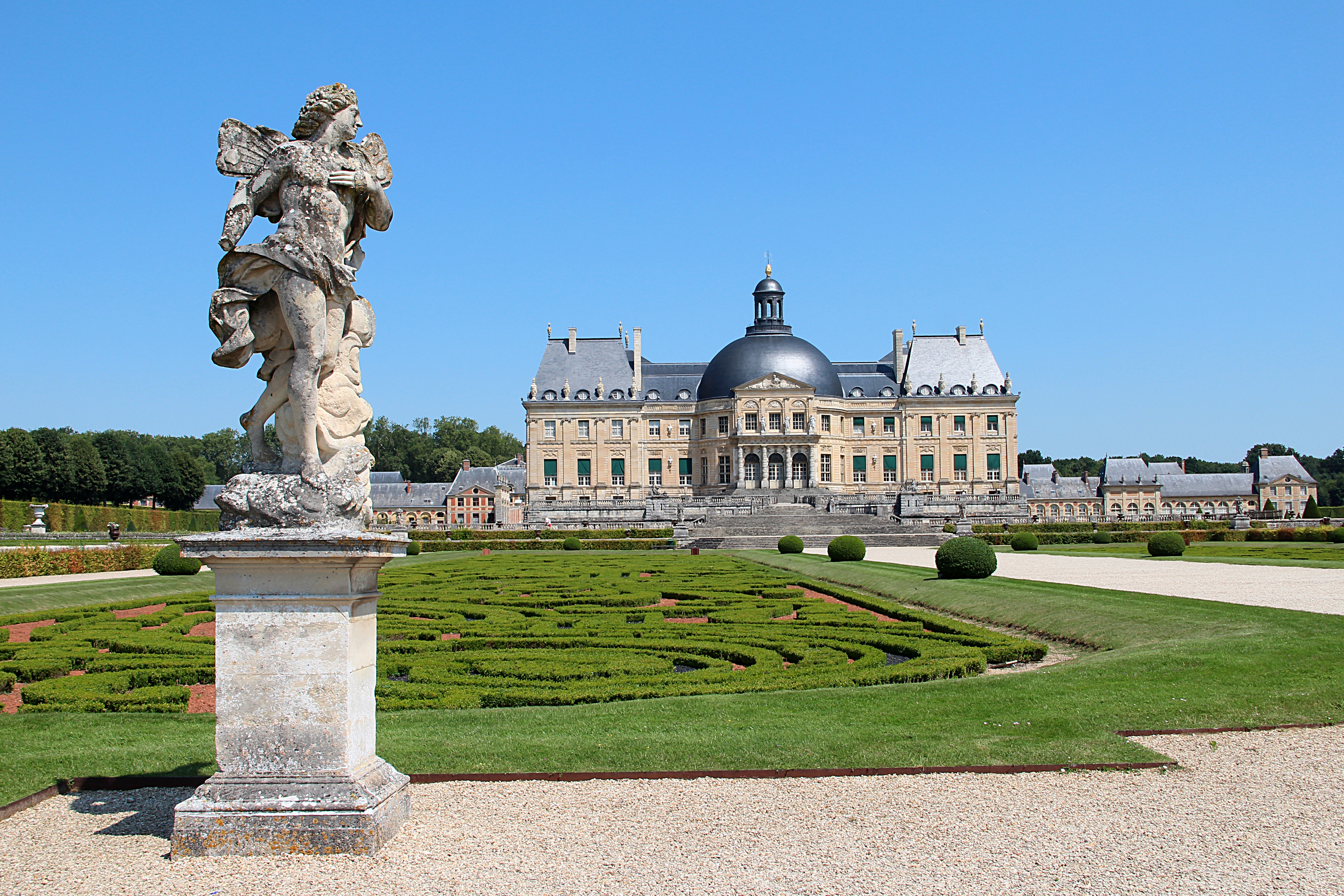 Jardins et château de Vaux-le-Vicomte - Maincy (Seine-et-Marne, France).